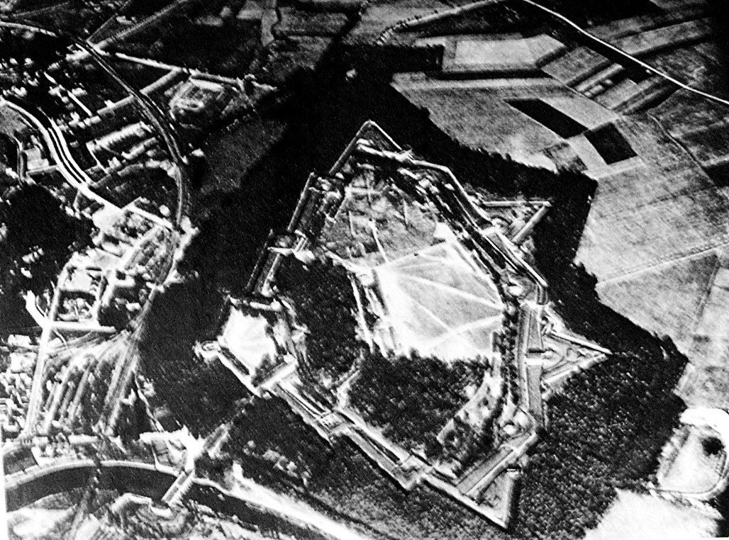 Cytadela 1923, lotnicze